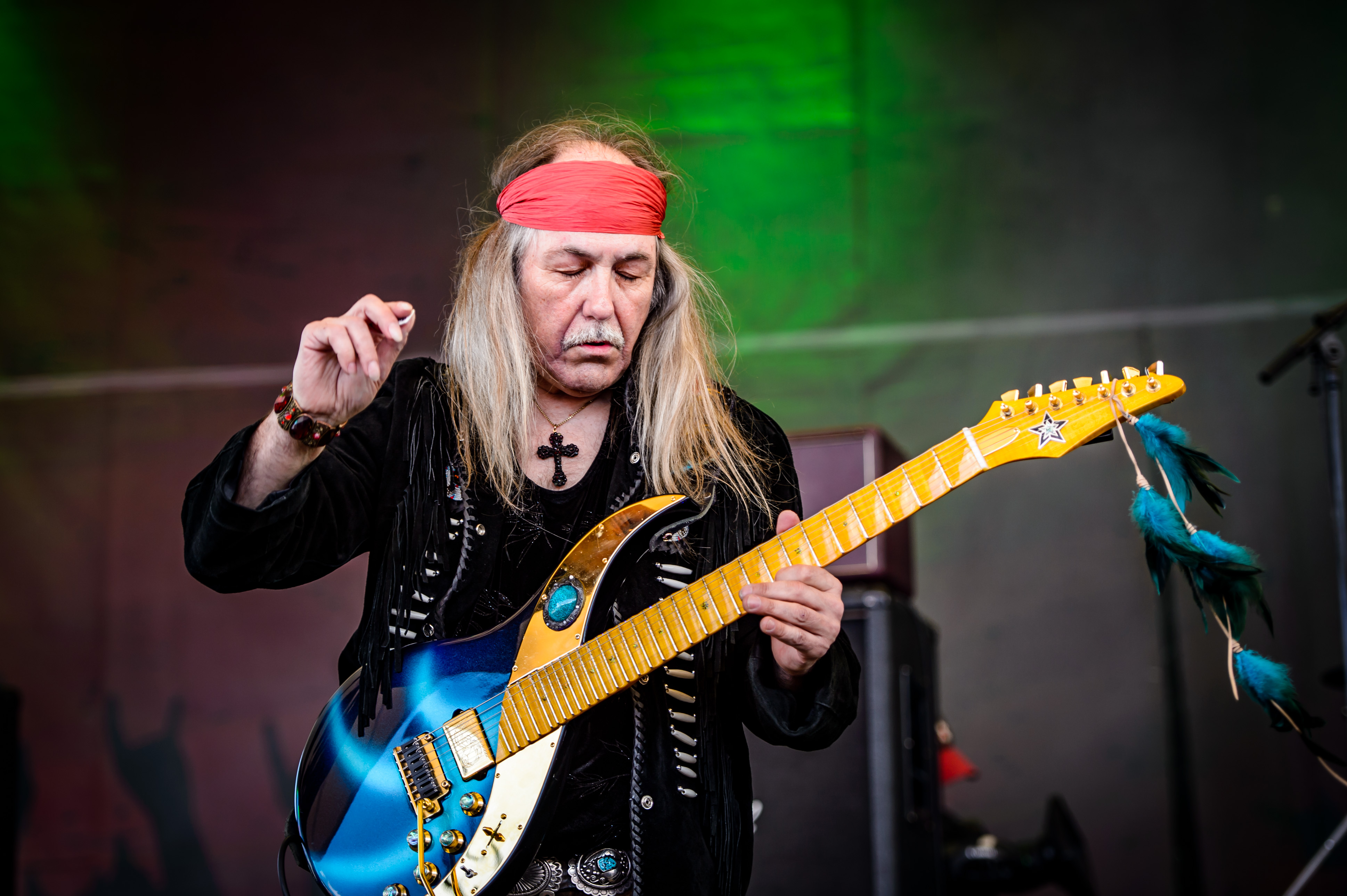 'Rock Hard Festival 2018; Amphitheater Gelsenkirchen': 'Uli Jon Roth'